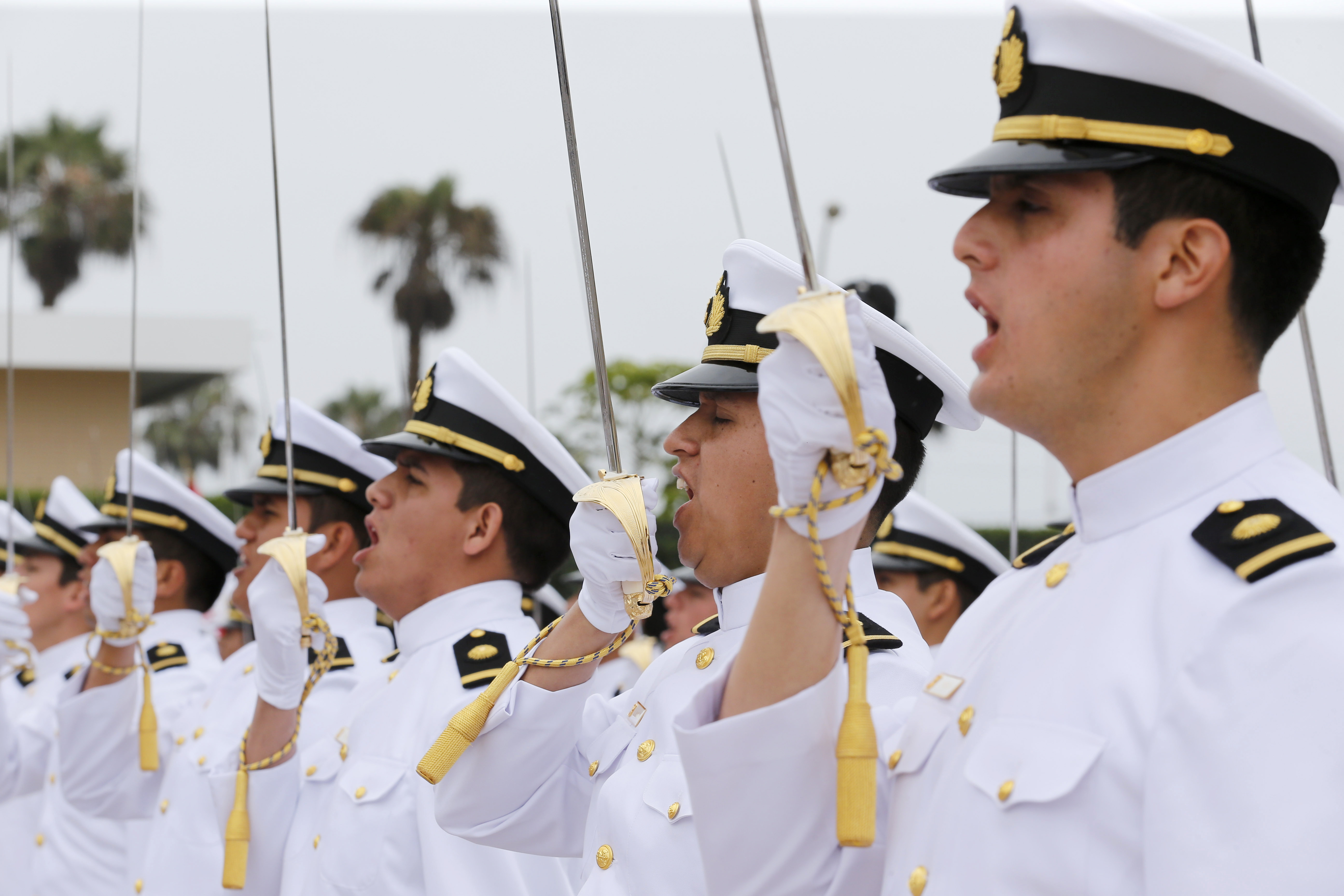 El Presidente de la República Ollanta Humala Tasso, acompañado por el Ministro de Defensa Jakke Valakivi, presidió la ceremonia de graduación de los cadetes de la escuela naval de la Marina de Guerra del Perú en La Punta Callao.